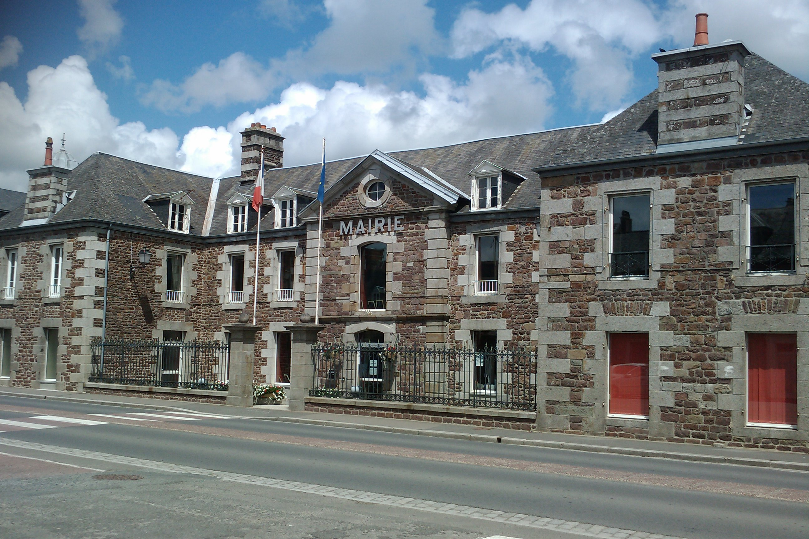 mairie de Gavray